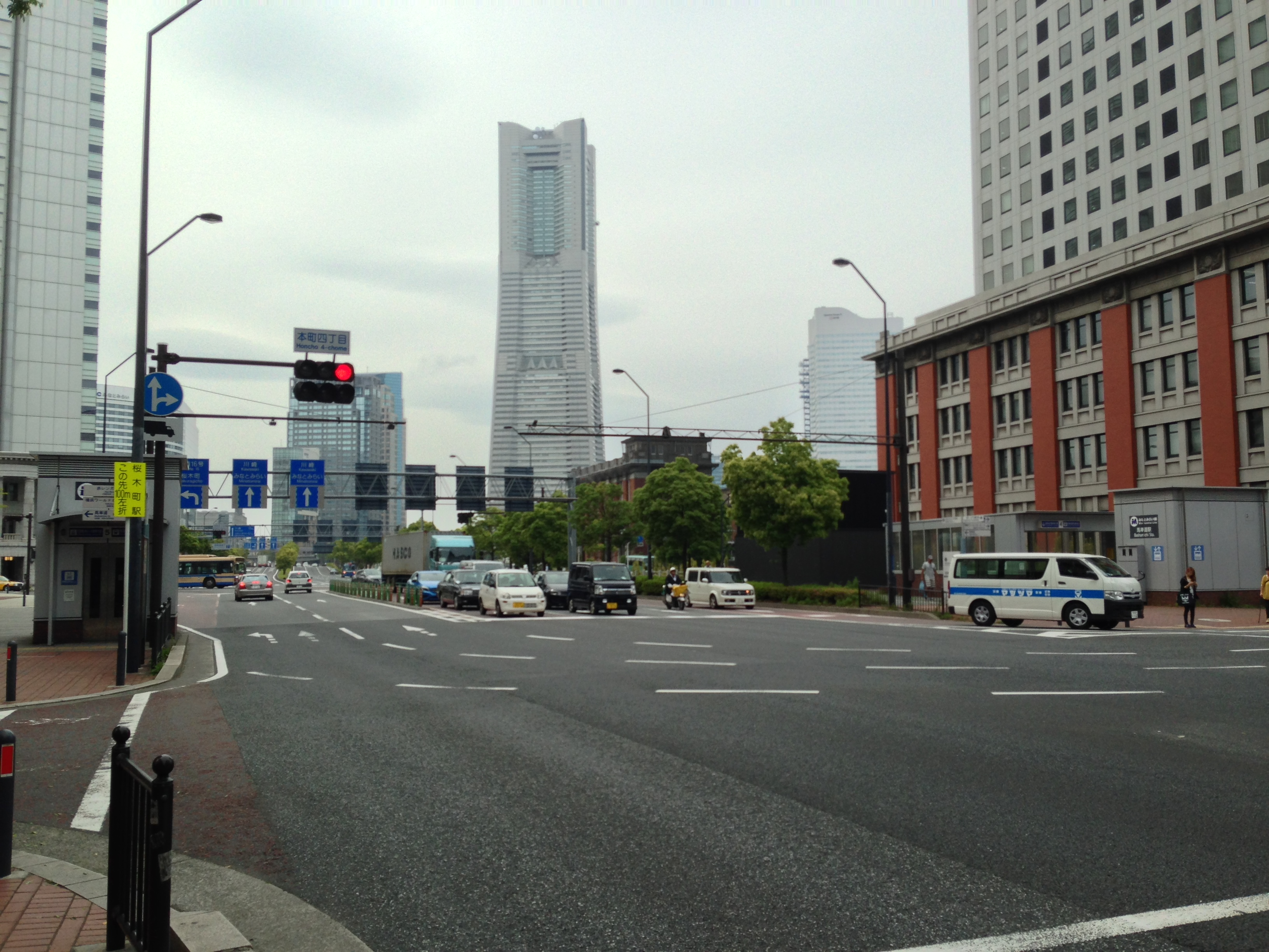 横浜市の都市計画道路「栄本町線」終点、本町四丁目交差点。交差点奥の道路がポートサイド地区より続いていた本線である。右側には横浜第二合同庁舎（旧横浜生糸検査所）が見える。